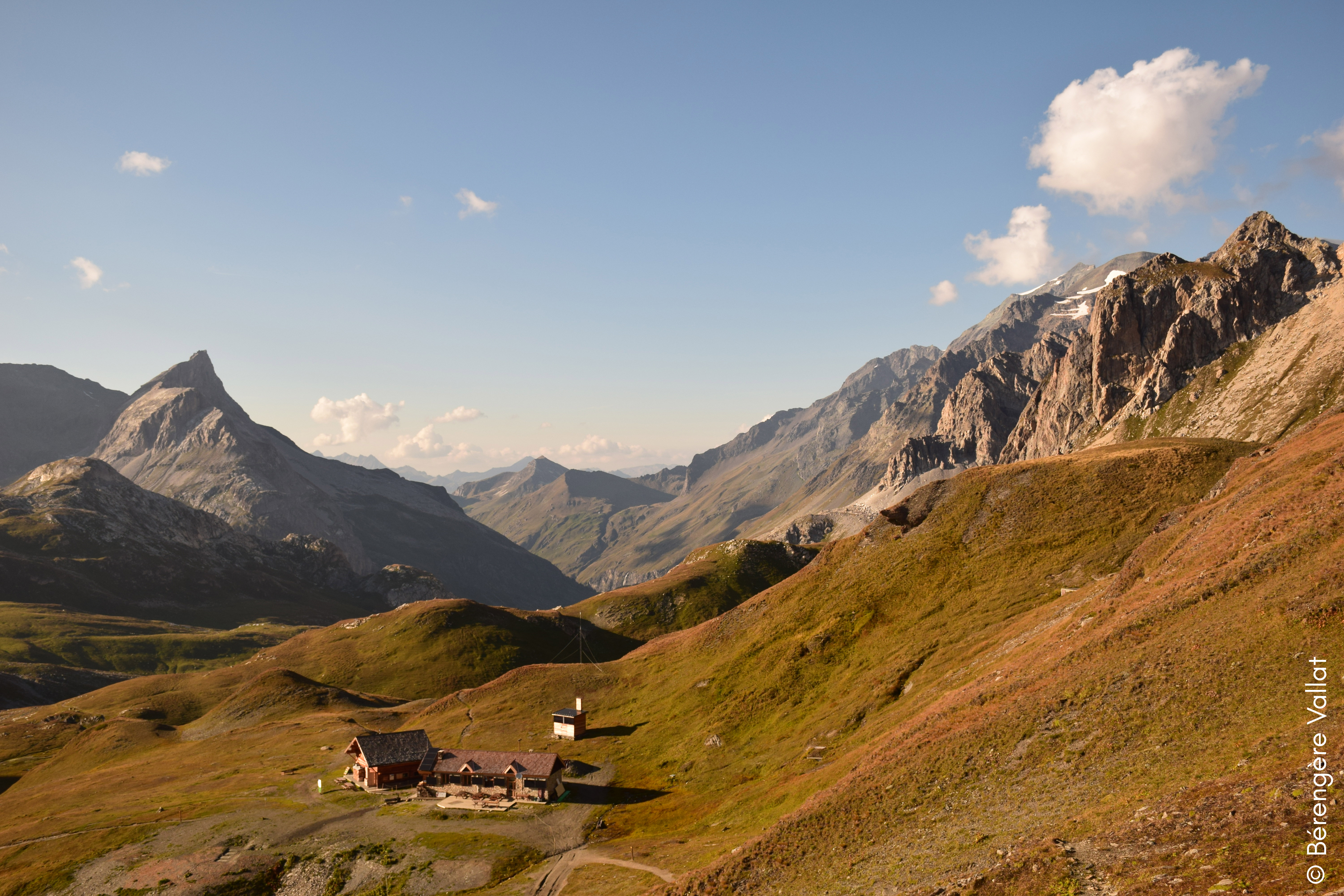 Refuge en été